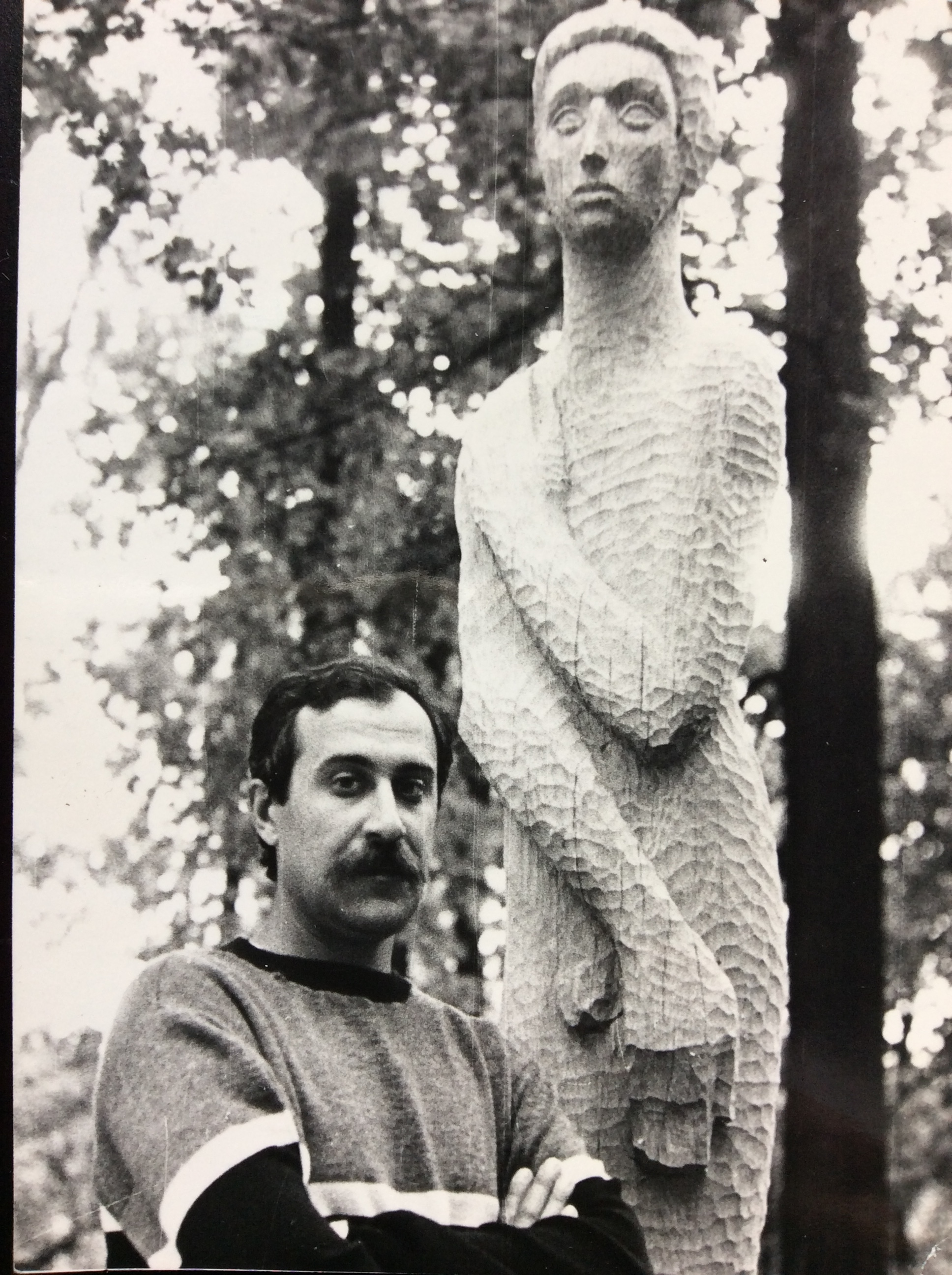 Скульптор А.Костин парковая скульптура